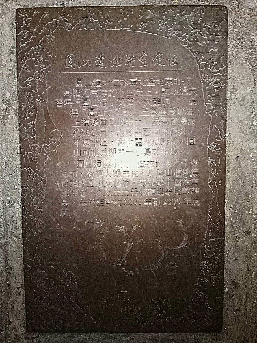 臺北市圓山捷運站外往淡水方向，原兒童育樂中心外人行道